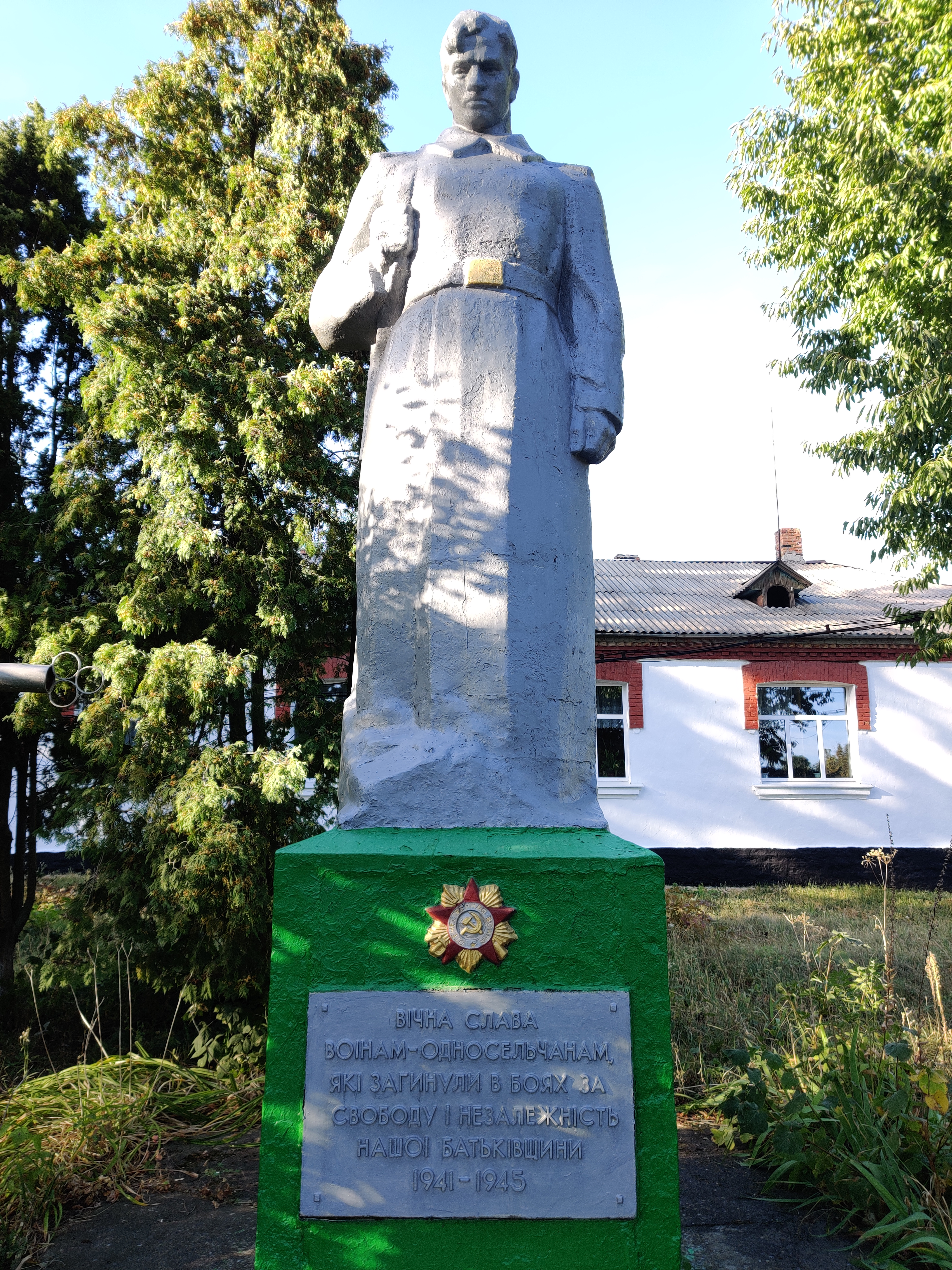 Пам'ятник 108 воїнам-односельчанам, загиблим на фронтах Великої Вітчизняної війни, Кузьминці, біля школи